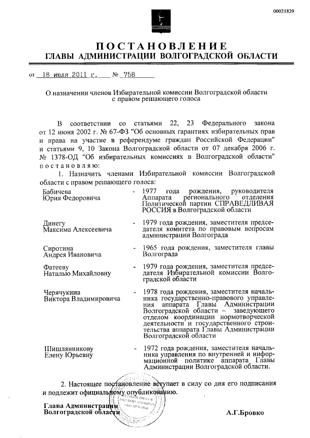 Постановление главы администрации Волгоградской области № 758 от 18 июля 2011 года «О назначении членов избирательной комиссии Волгоградской области с правом решающего голоса».